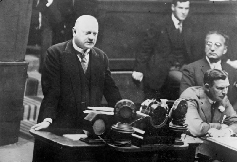 Der deutsche Reichsaussenminister und Friedens-Nobel-Preisträger Dr. Stresemann gestorben! Aus dem Wirken des Reichsaussenministers Dr. Stresemann! Reichsaussenminister Dr. Stresemann am Rednerpult im Völkerbund in Genf.